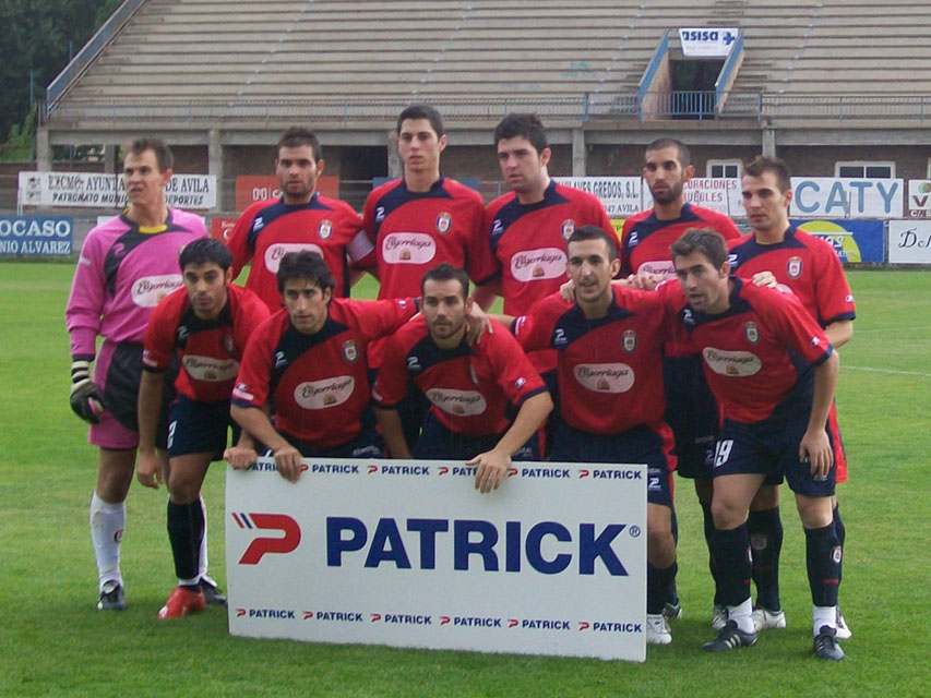 Alineación del Real Ávila, equipo de fútbol de la ciudad de Ávila, España. Viste camiseta roja y pantalones azules.